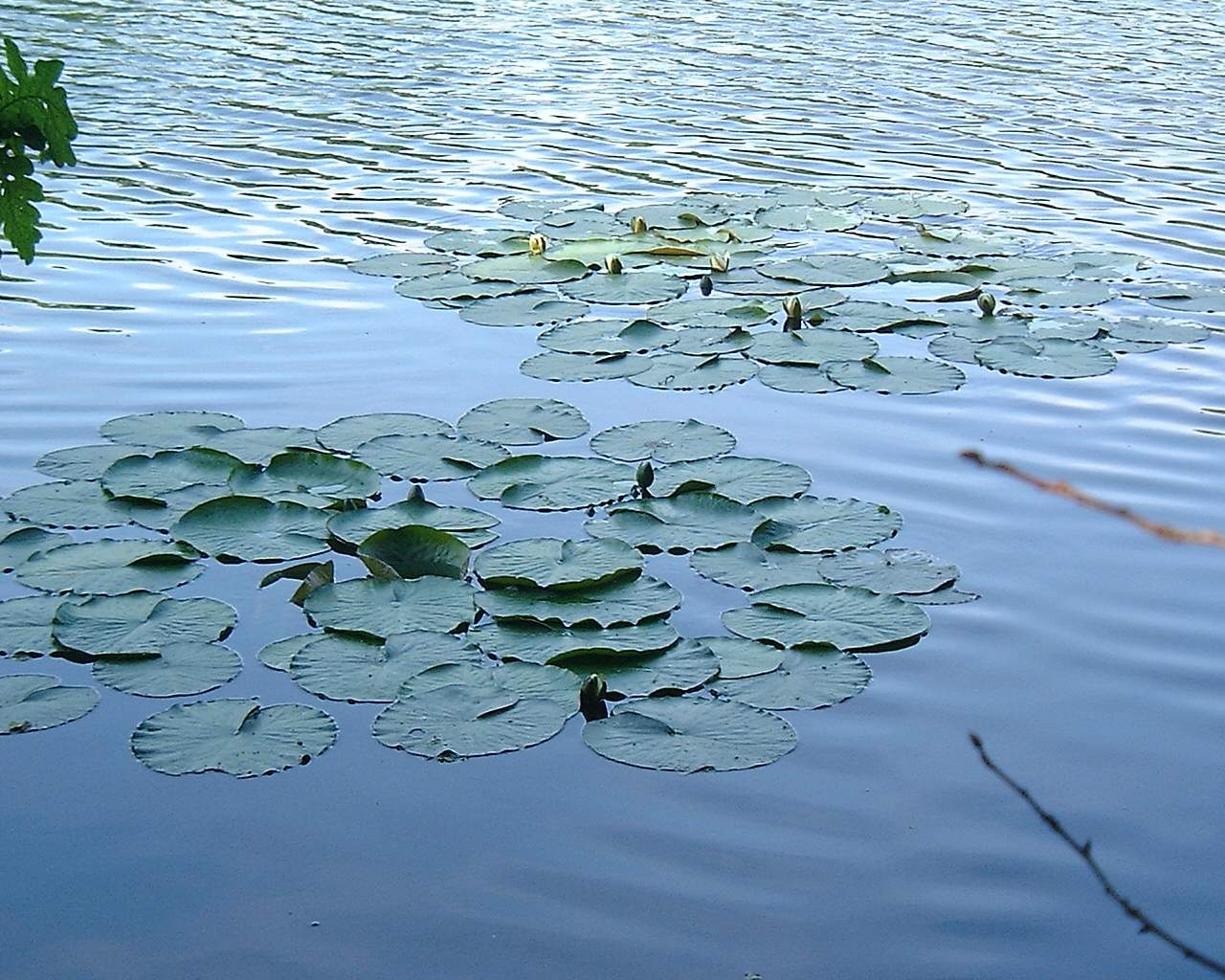 Laduviken, Djurgården, Stockholm, Sweden.